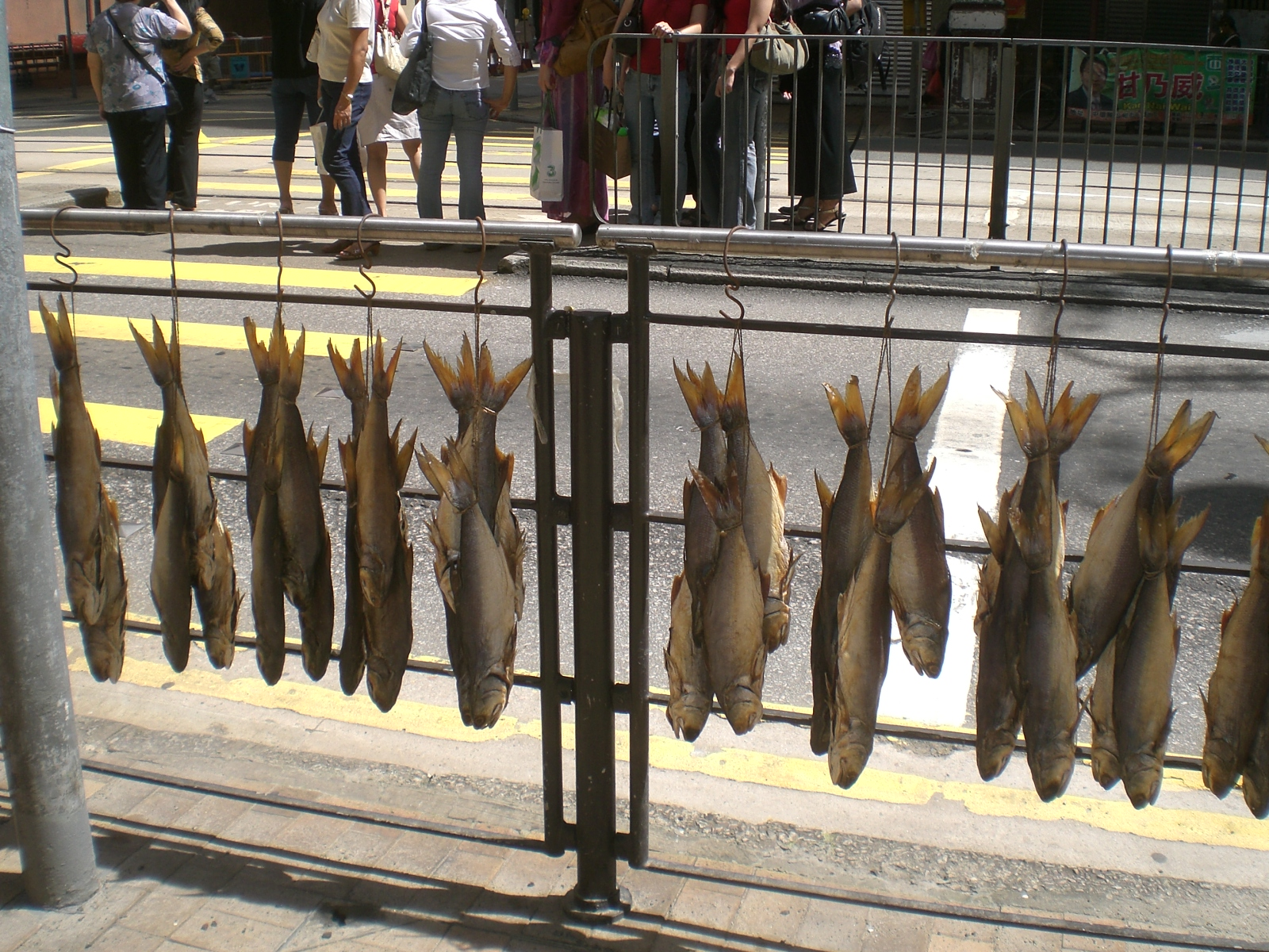 中文（香港）: 西環德輔道西海味街人行道欄杆鹹魚曬太陽